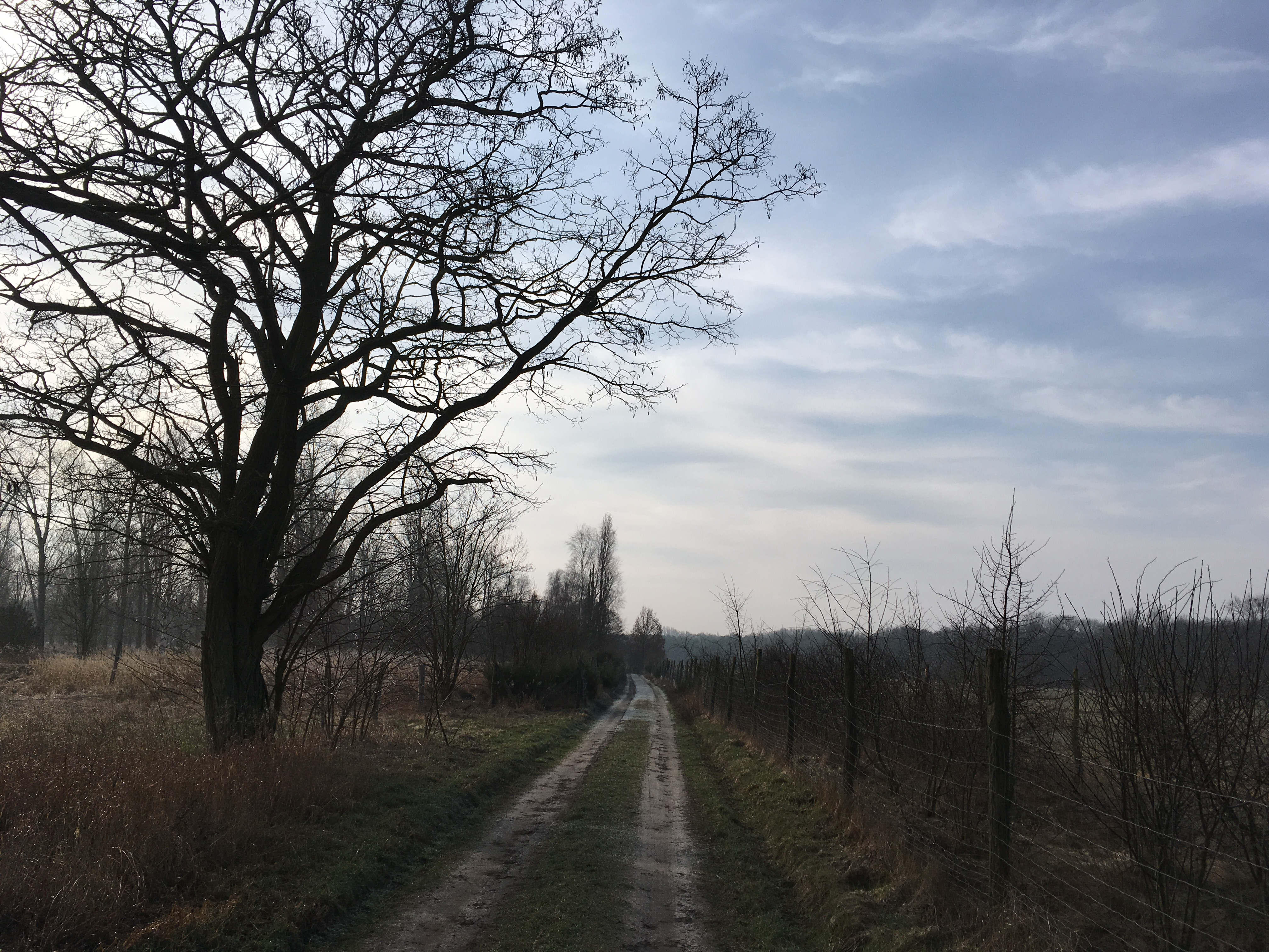 Infotafel und Rundwandweg auf die Stiftungsfläche in Felgentreu, Nuthe-Urstromtal in Brandenburg